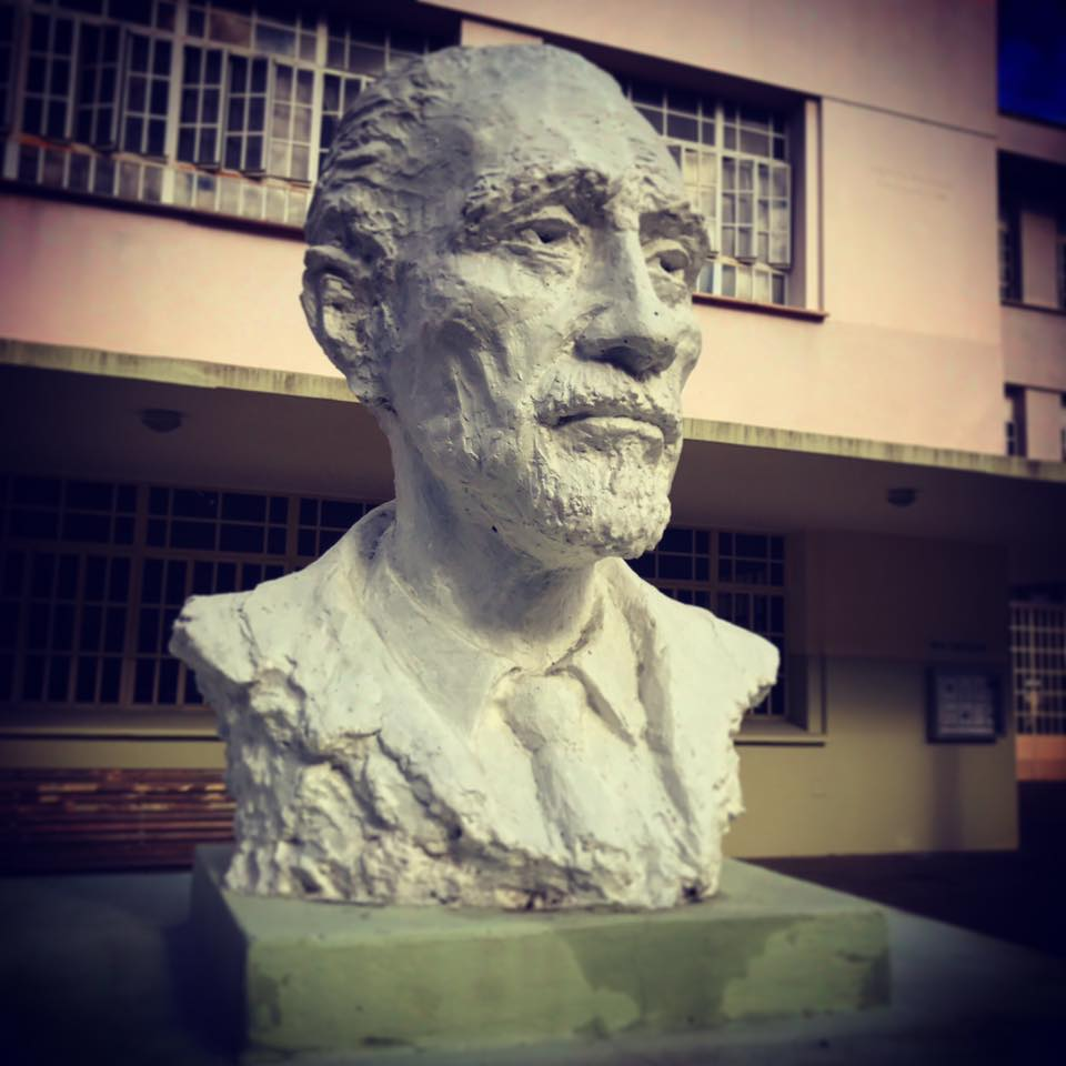 Busto del Dr. Enrique Pichon-Rivière (1907-1977), en el Hospital José Tiburcio Borda.Dirección General de Salud Mental del Gobierno de la Ciudad de Buenos Aires.